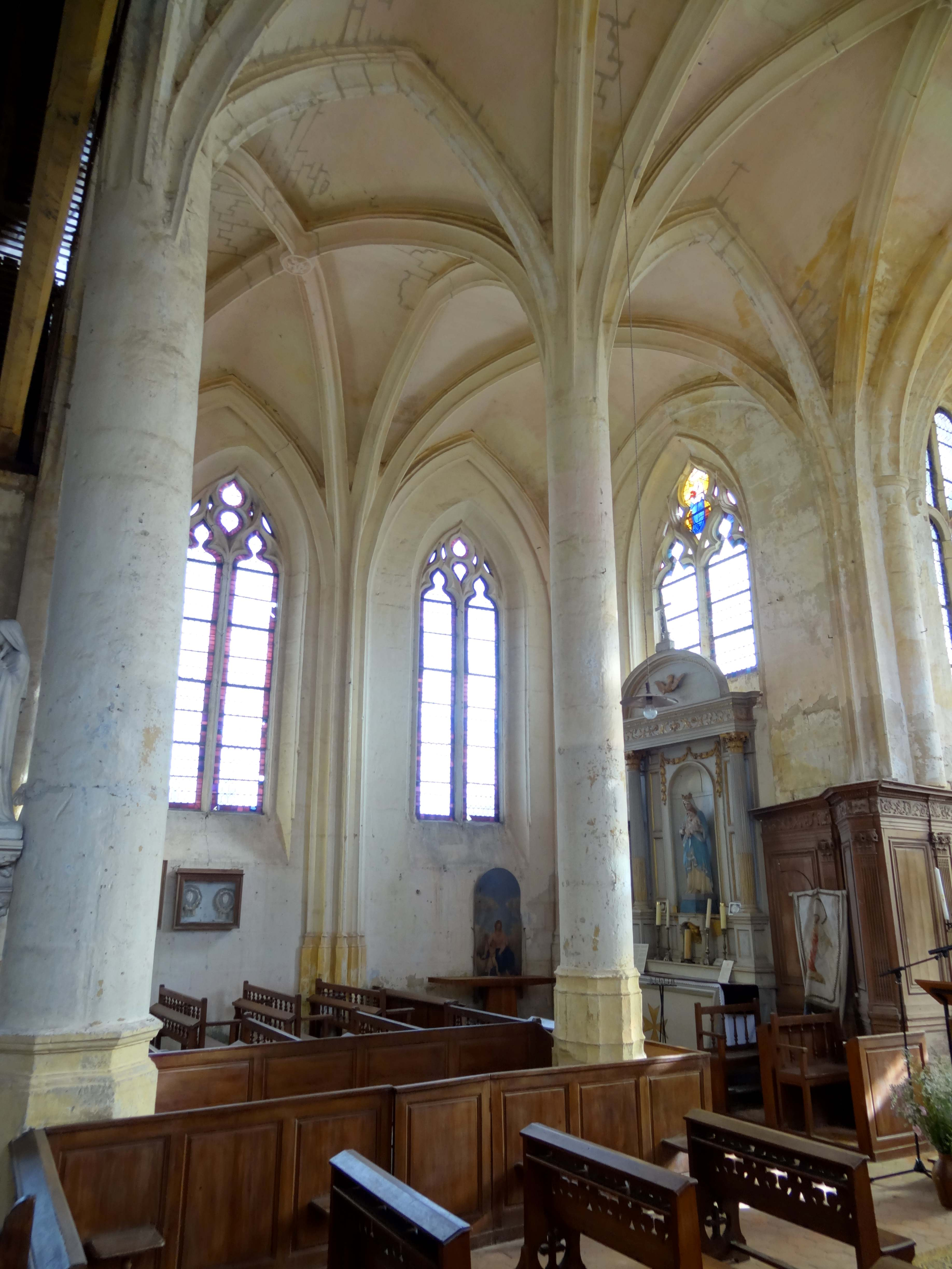 Intérieur de l'église - voir titre.